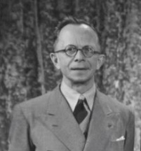 Vladimír Vochoč